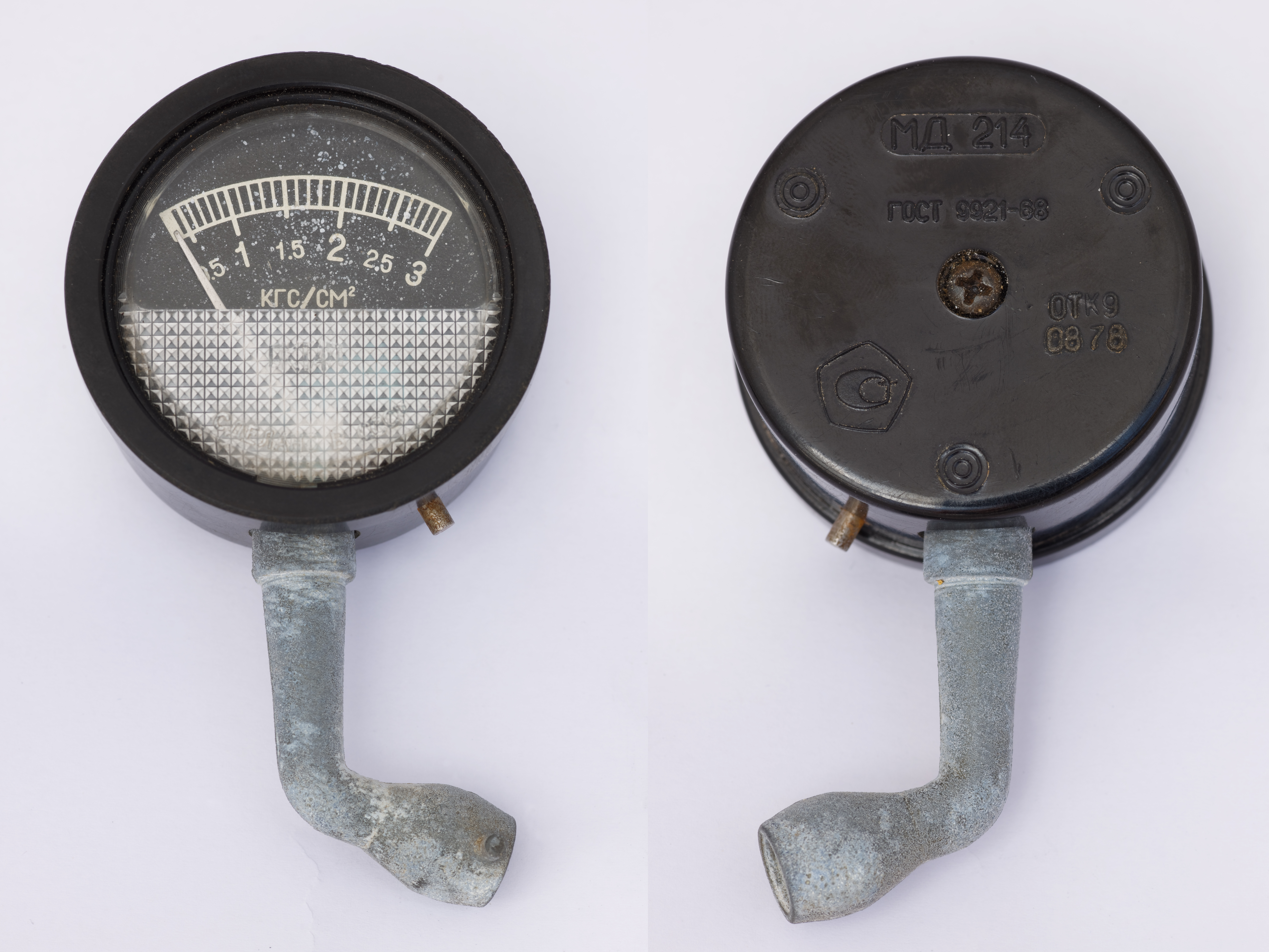 Russischer Manometer zur Messung des Reifendrucks am Auto. Messeinheit: kg/cm² GOST: 9924-68